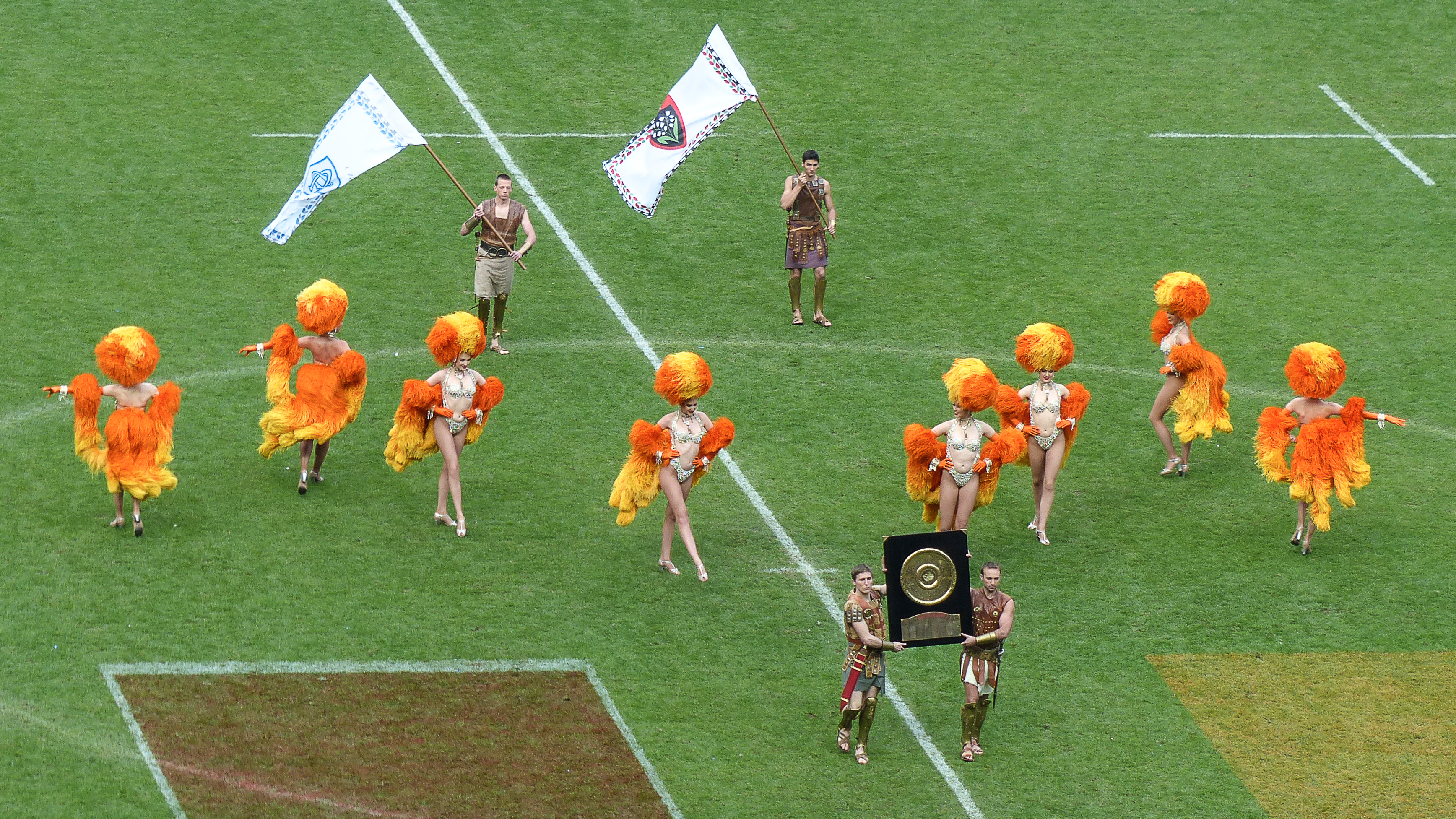 Finale du TOP 14 - Castres vs Toulon (19-14) - Stade de France - 1er juin 2013 Finale du TOP 14 - Castres vs Toulon (19-14) - Stade de France - 1er juin 2013.